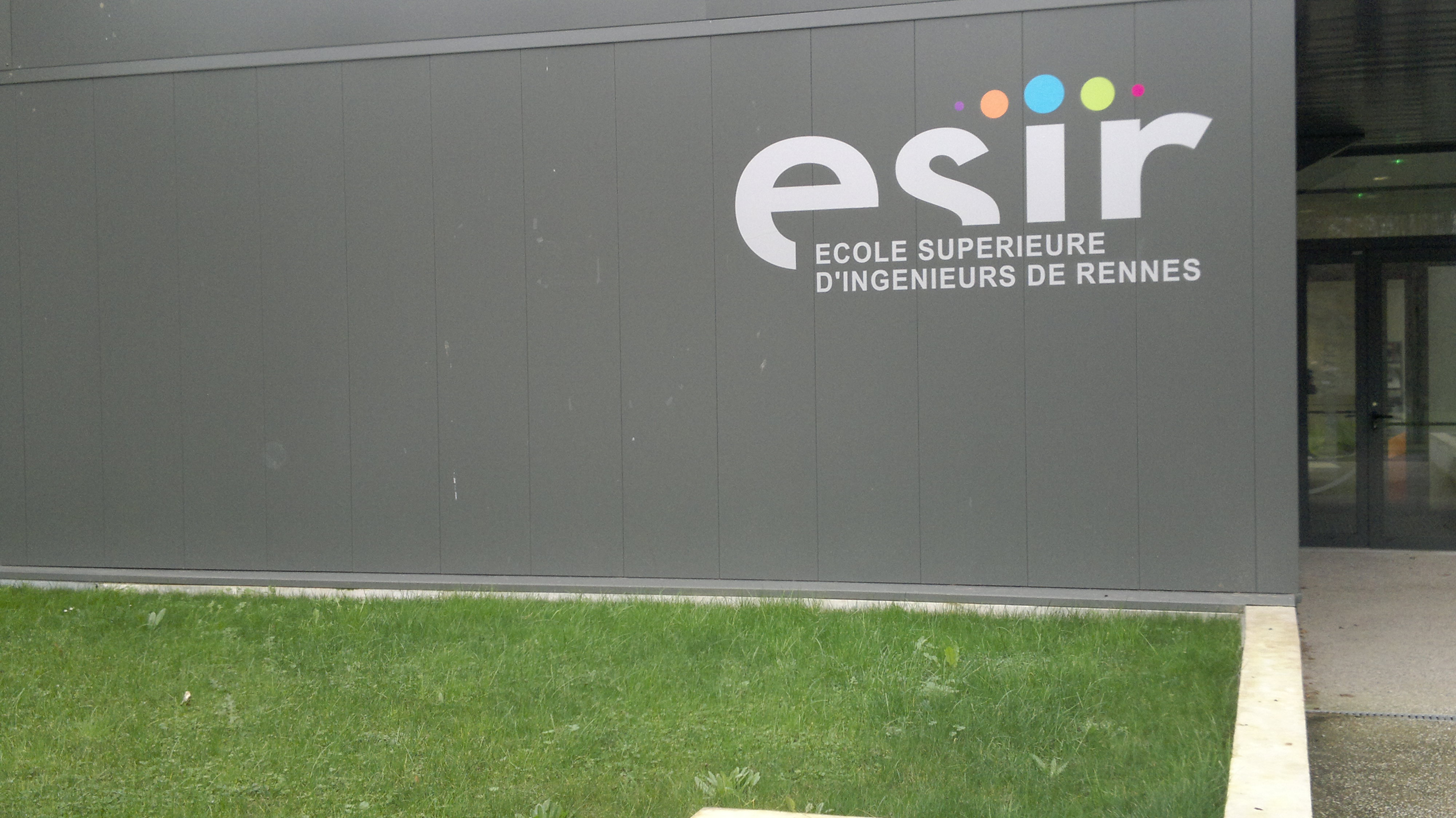 La façade du bâtiment 41bis du Campus de Beaulieu (Rennes)